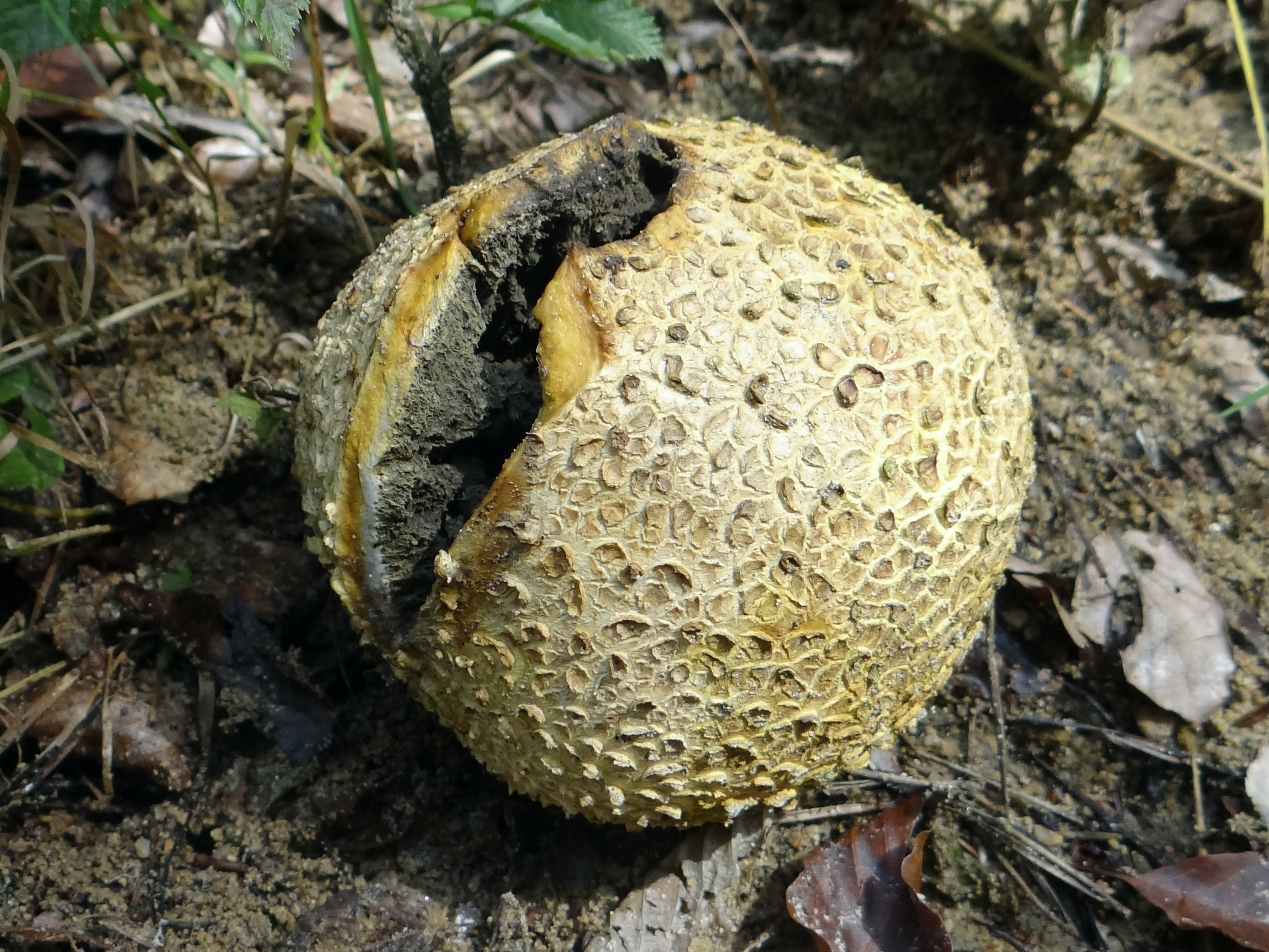 Scleroderma citrinum (location: Poland, Rdzawa (województwo małopolskie)